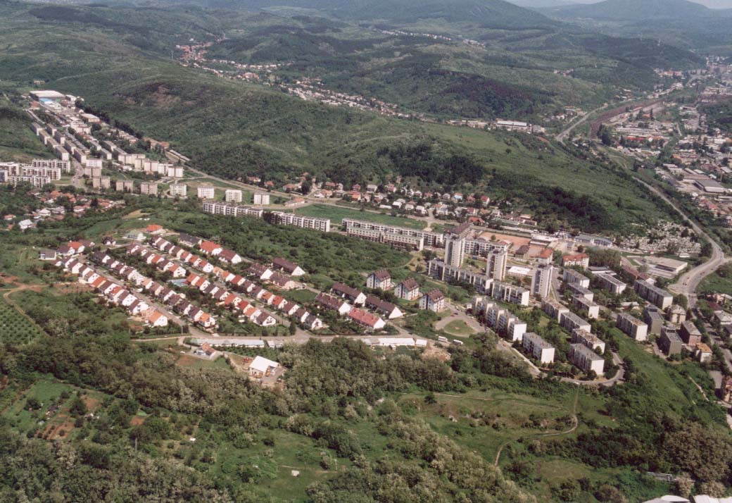 Salgótarján - Nógrád megye - Hungary - Europe